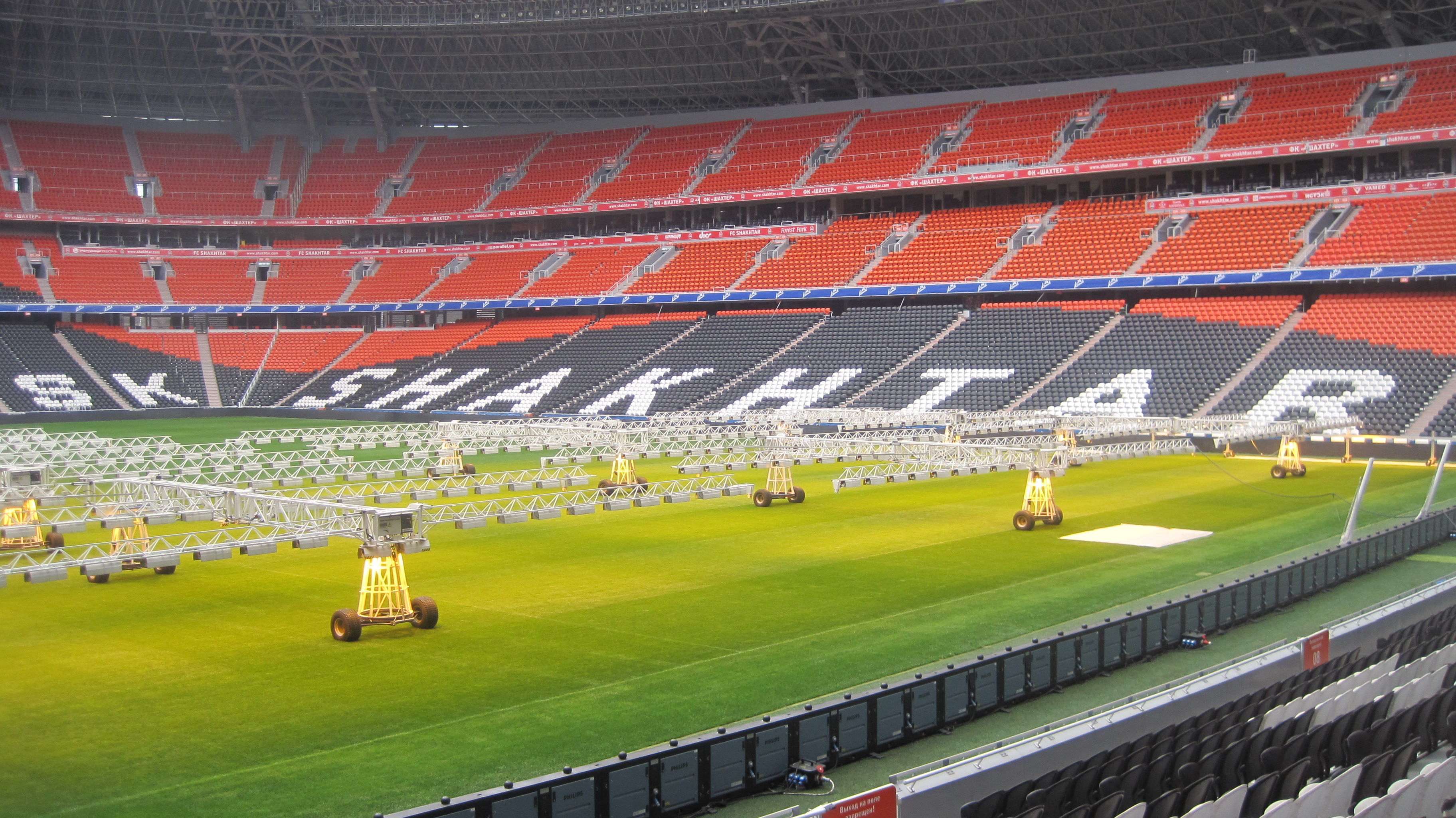 Stade du club Shakhtar à Donetsk en 2012